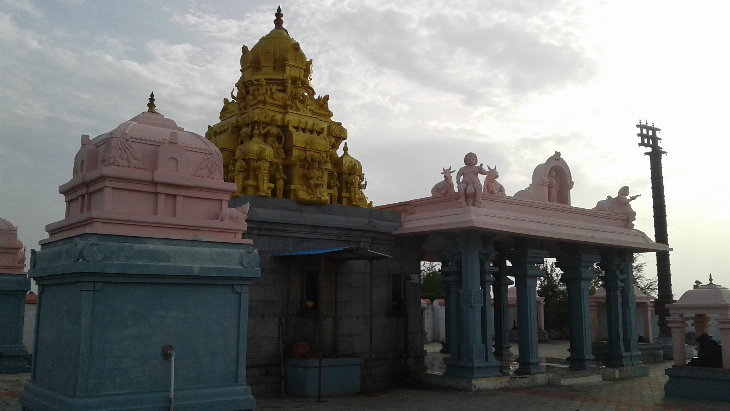 நந்தமேடு வீரபாண்டீசுவரர் கோயில்